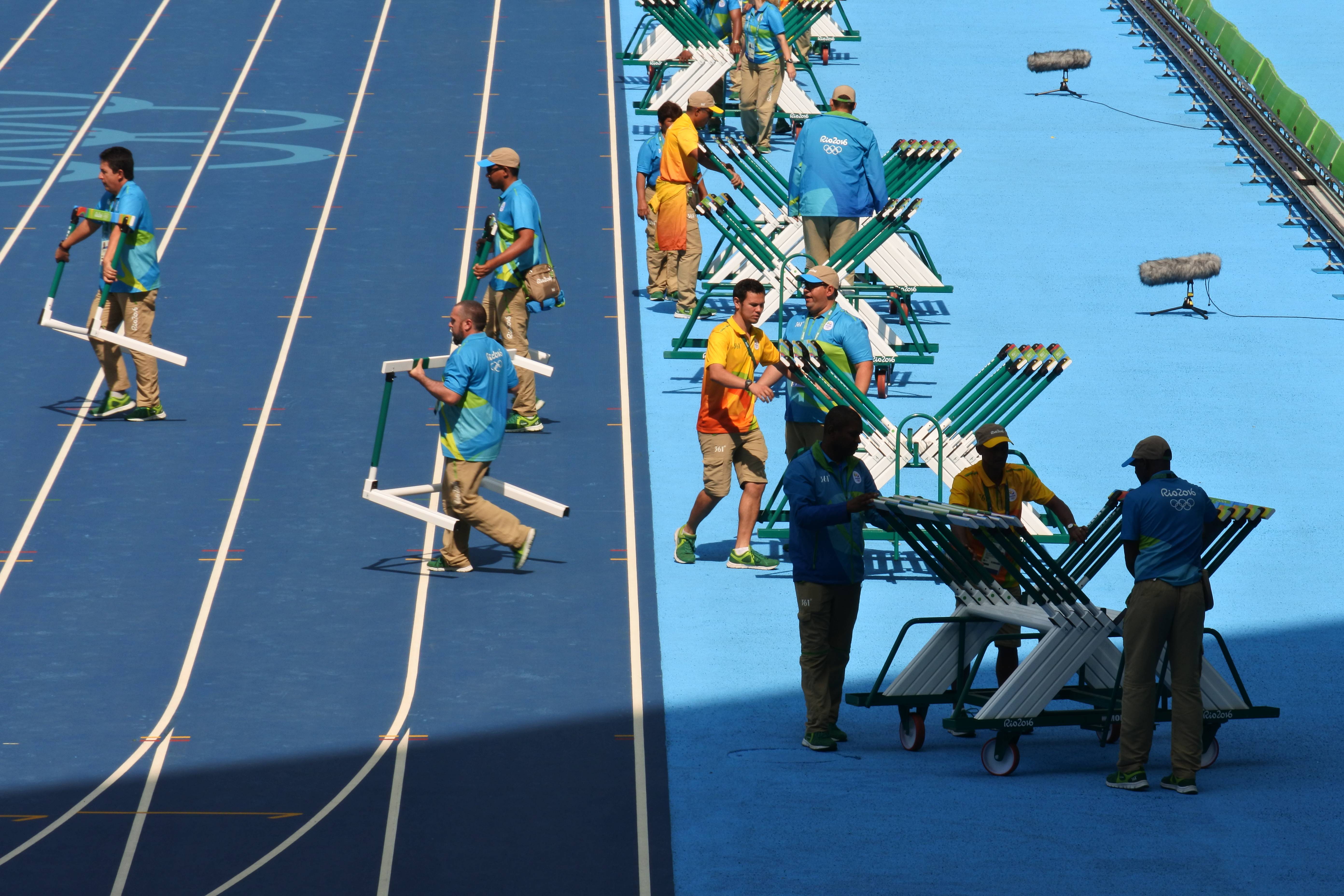 Rio 2016 - Voluntários organizando barreiras